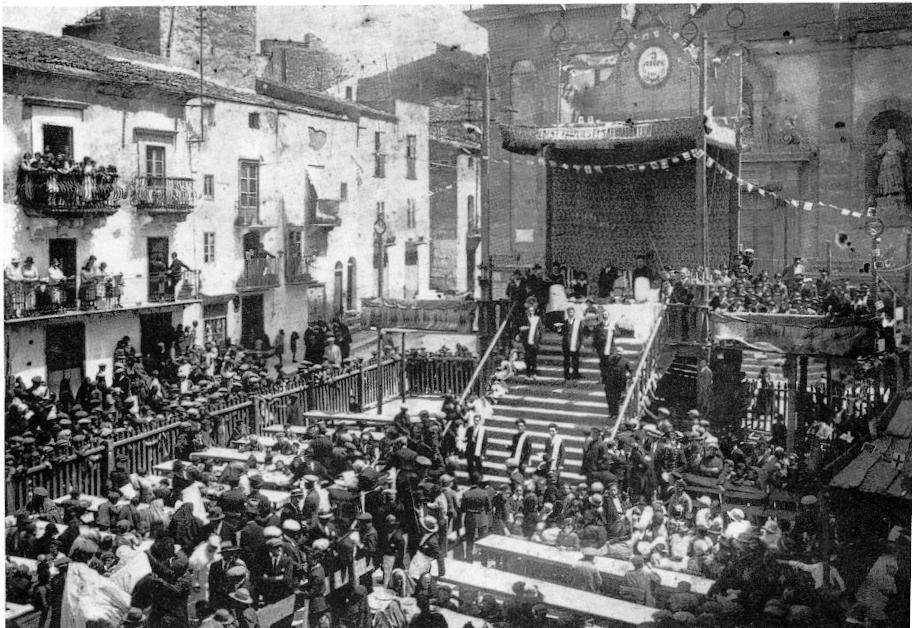 Vecchia foto della festa del Patrocinio ad Alcamo (Piazza Ciullo, di fronte la chiesa del Gesù)